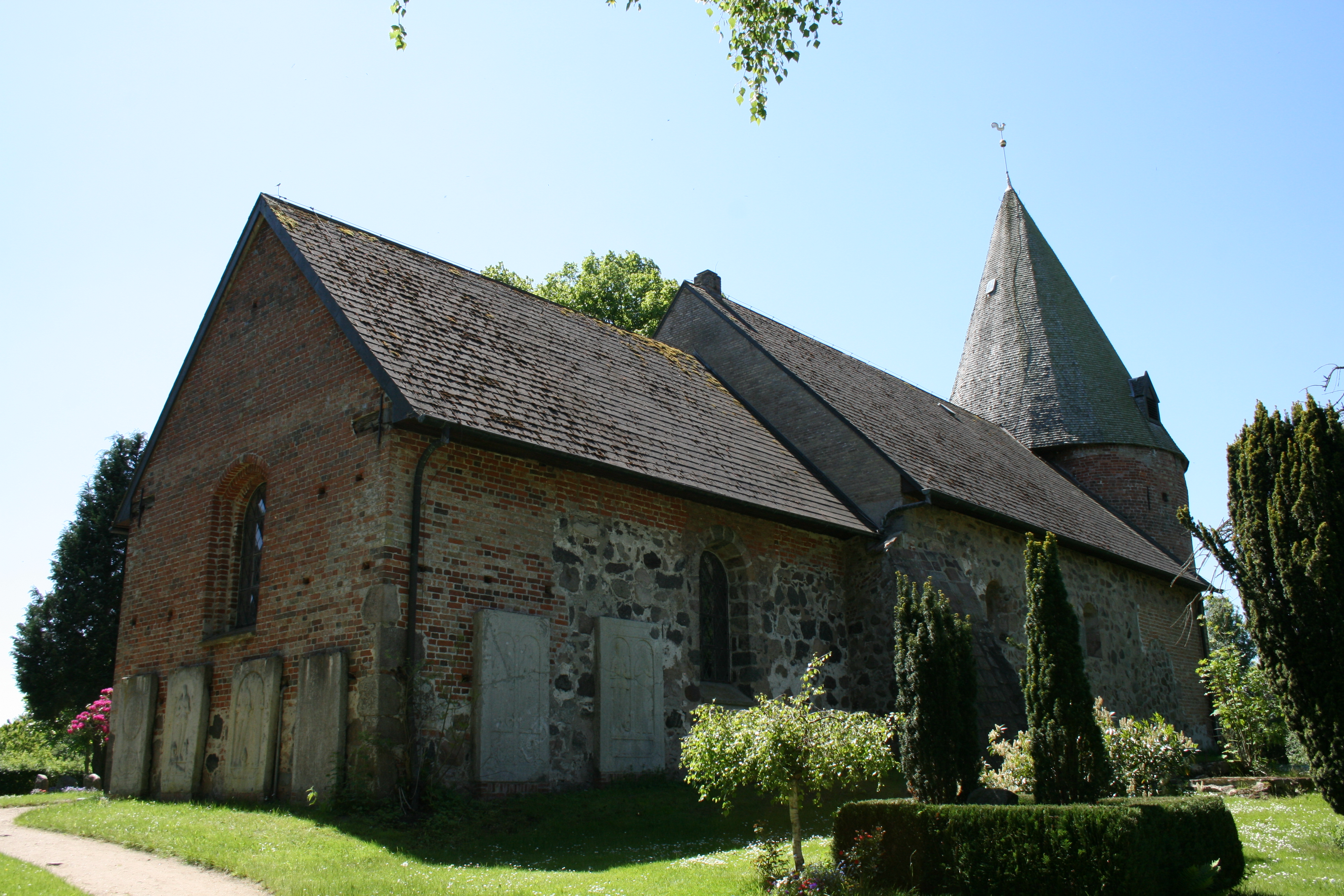 Laurentius-Kirche Kosel (Schleswig-Holstein)